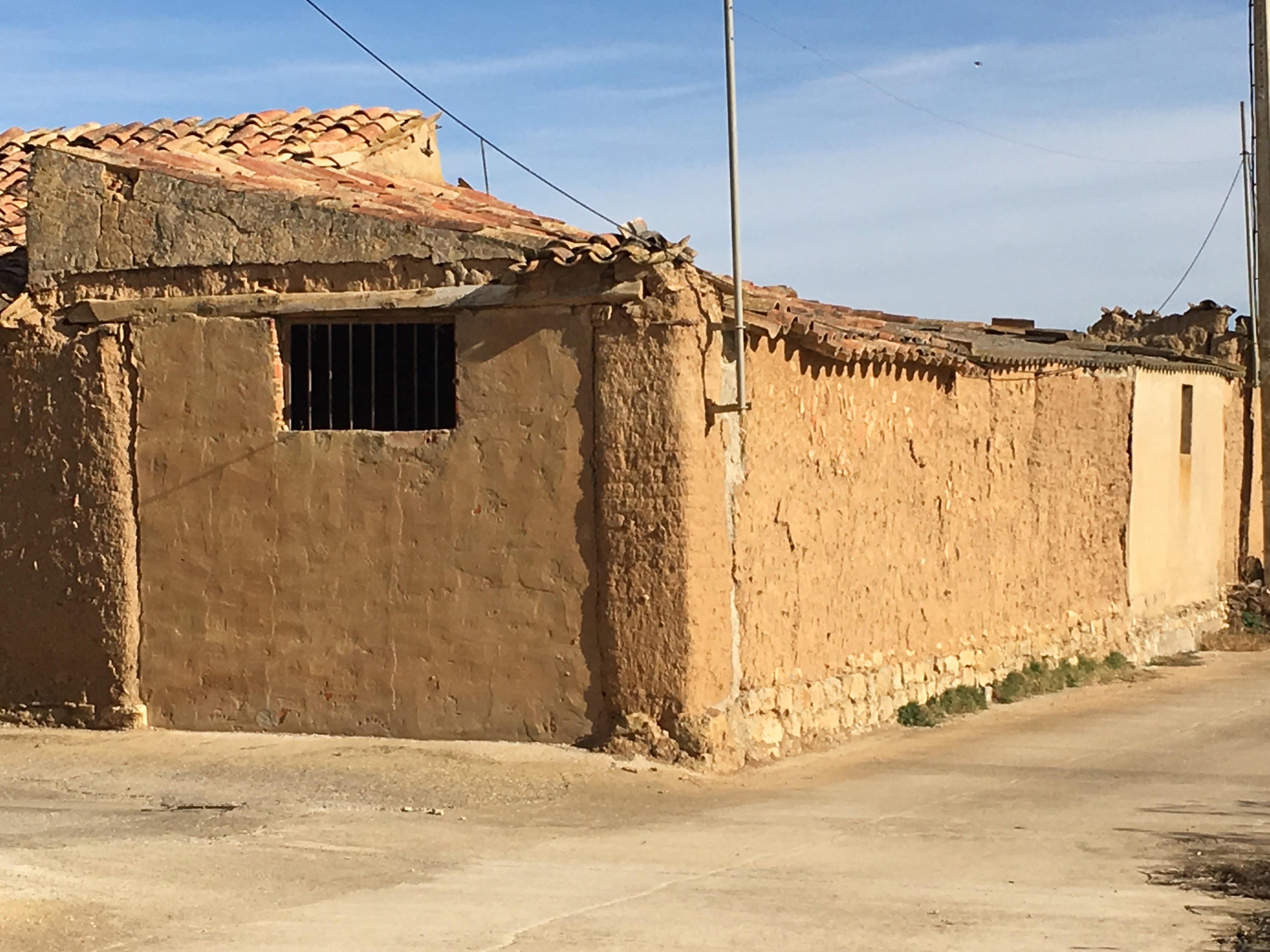 Villaesper Milenario